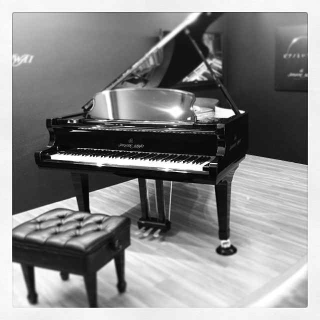 Shigeru Kawai Grand Piano - Beautiful figure piano